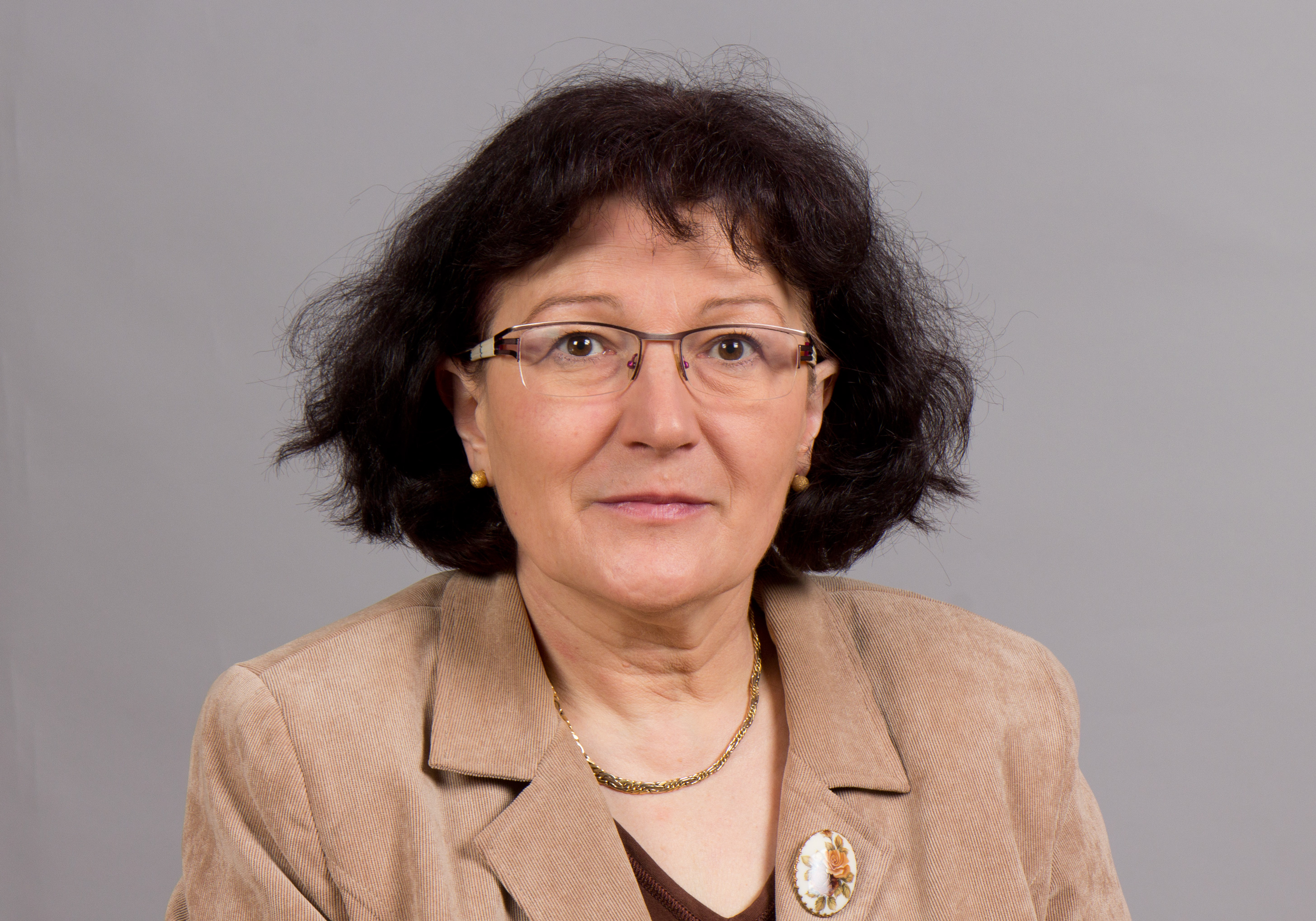 Marlies Kohnle-Gros (* 7. März 1965 in Dornstadt) ist eine deutsche Politikerin (CDU) und Mitglied des Landtages von Rheinland-Pfalz. Landtag Rheinland-Pfalz 2014 19. bis 20. Februar 2014 in MainzDieses Foto wurde im Rahmen des Projektes „WIKI loves parliaments/Landtag Rheinland-Pfalz“ erstellt. Fragen zur Nachnutzung Wenn Sie Fragen zur Nachnutzung dieses Bildes haben, können Sie sich jederzeit gern an wenden